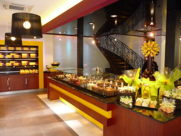 PHOTO MAG MONNAIE